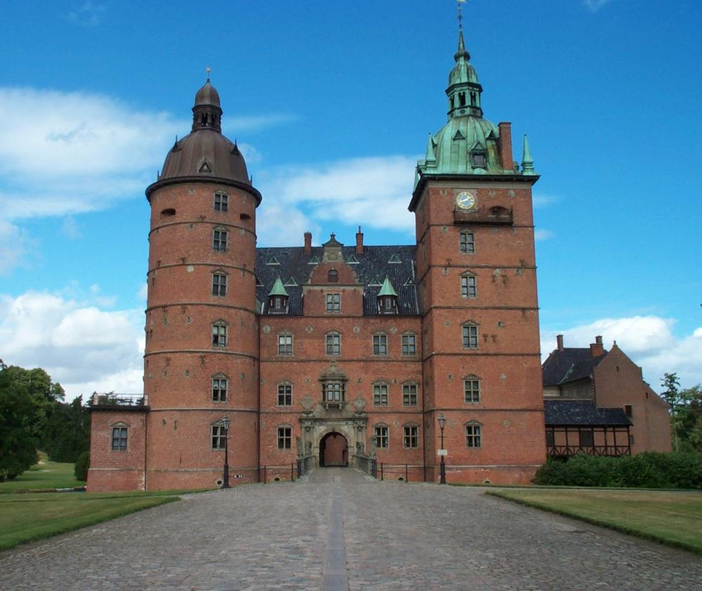 Vallø Slot, Vallø Kommune, Danmark Description in de wikipedia: Beschreibung: Schloss Vallø, Dänemark Quelle: Selbst fotografiert, 23. August 2003 Lizenzstatus: Public Domain